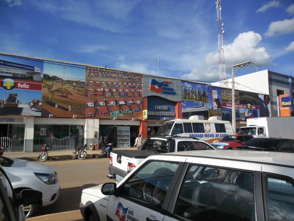 lem